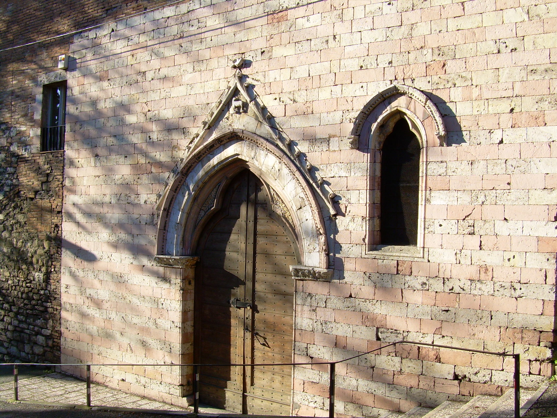 Facciata con portale gotico trilobato, su cui è scolpito un agnello con stendardo, simbolo delle monache Benedettine e una colomba, simbolo delle monache Domenicane della Beata Colomba .